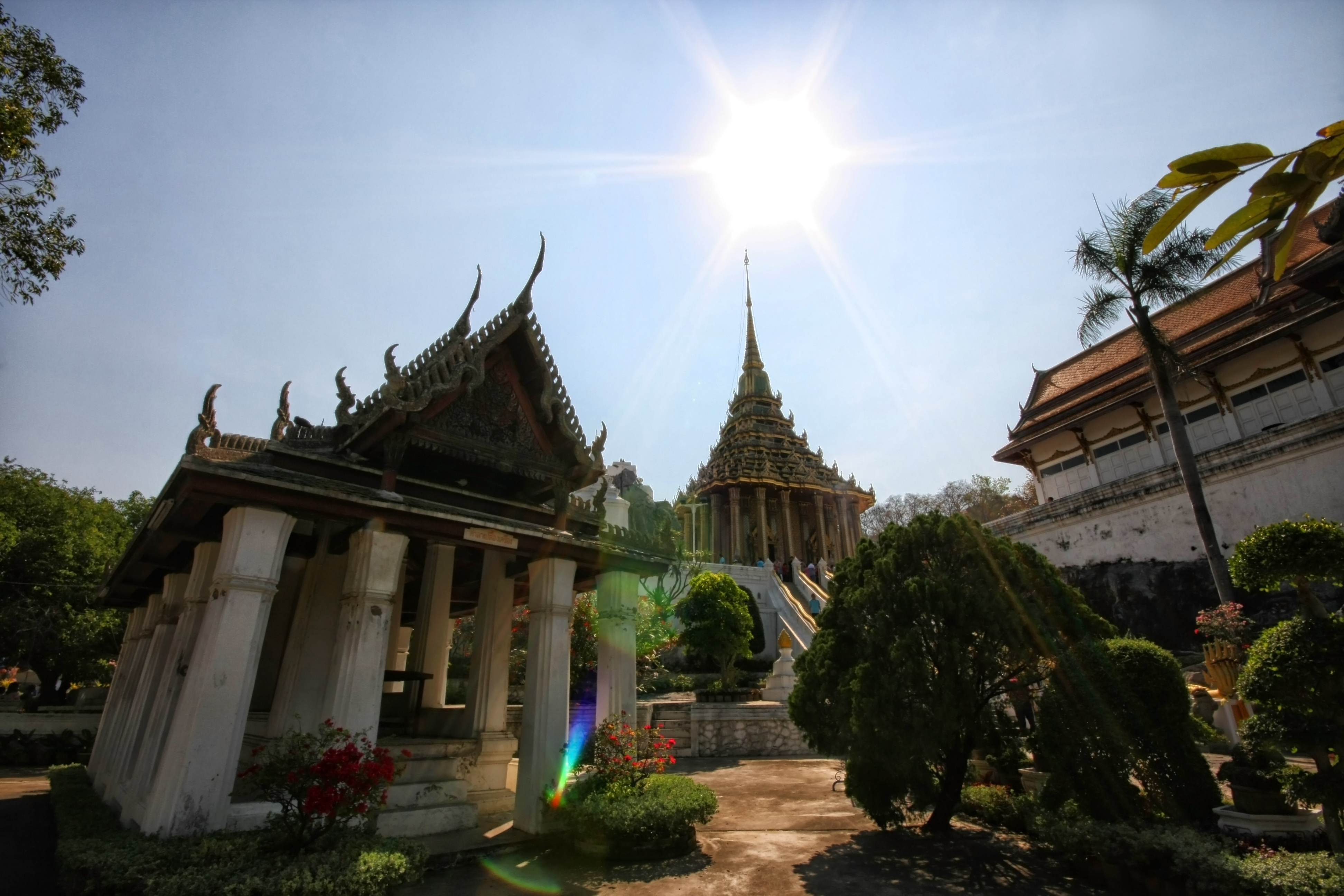 พระพุทธบาท (วัดพระพุทธบาท)